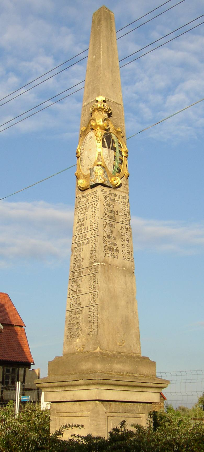 Postmeilensäule in Kemberg in Sachsen-Anhalt, Deutschland